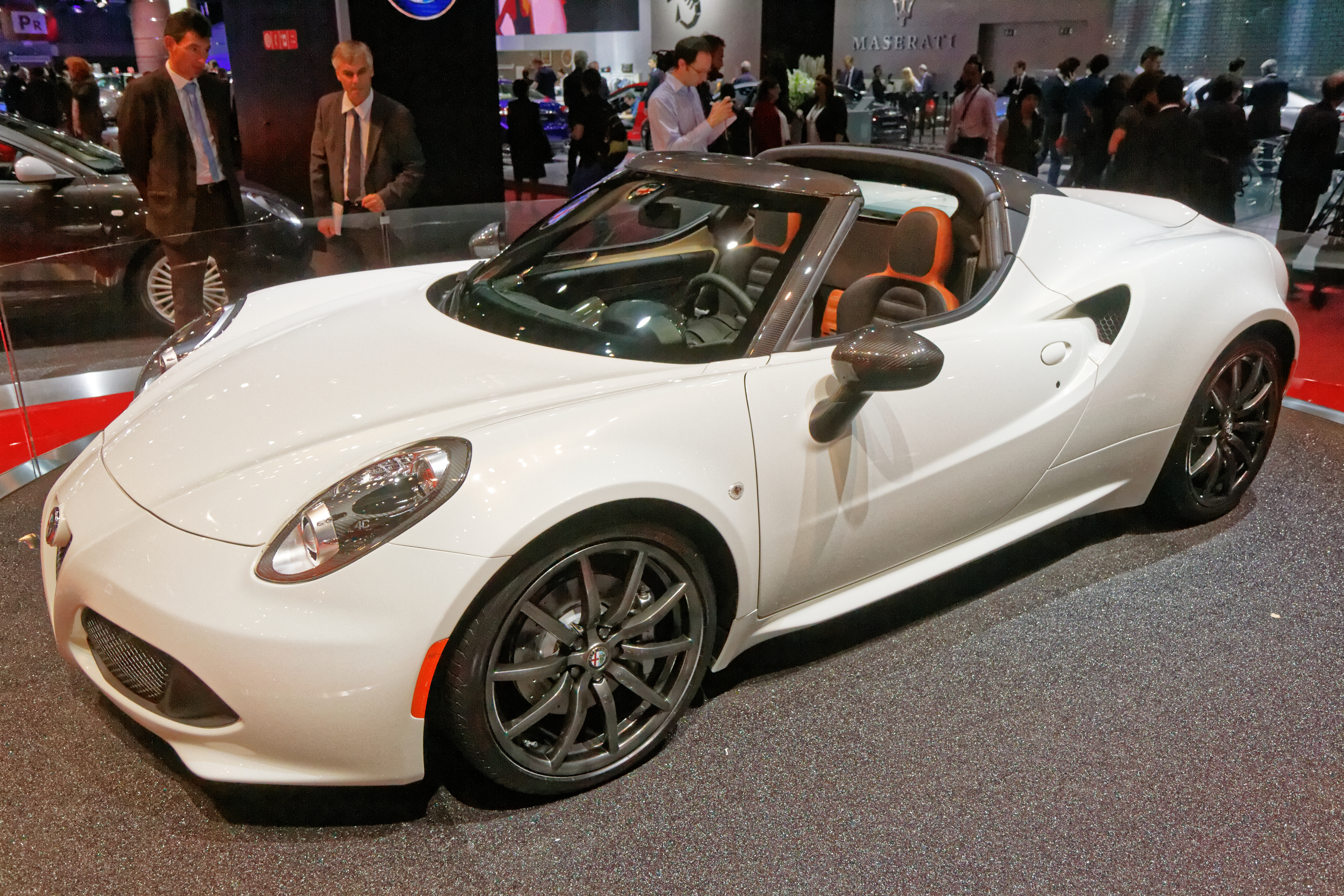 Une Alfa Romeo 4C Spider présentée lors du mondial de l'automobile de Paris 2014.